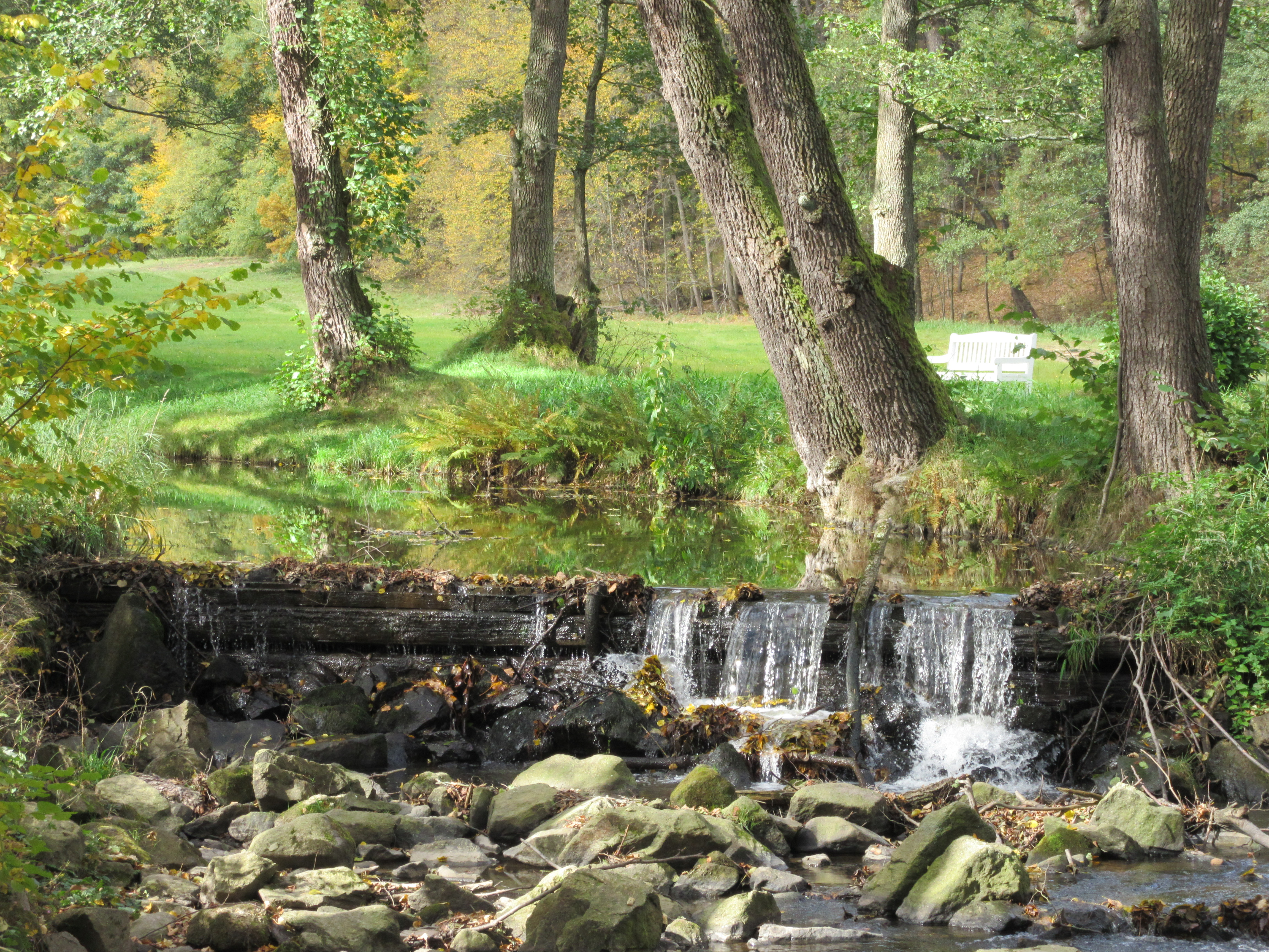 Terčino údolí - potok